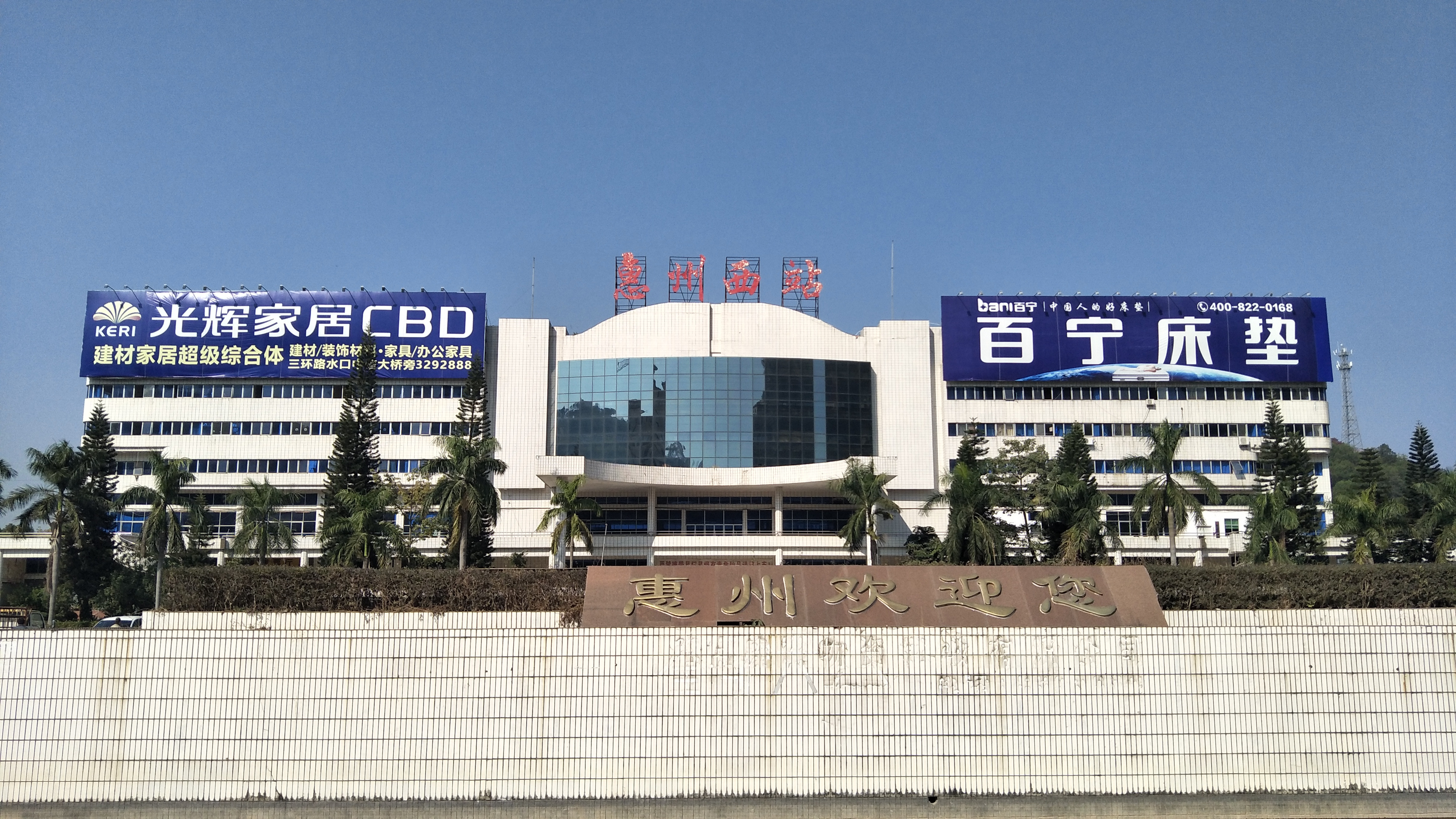 中文（中国大陆）: 中国铁路京九线惠州西站大楼